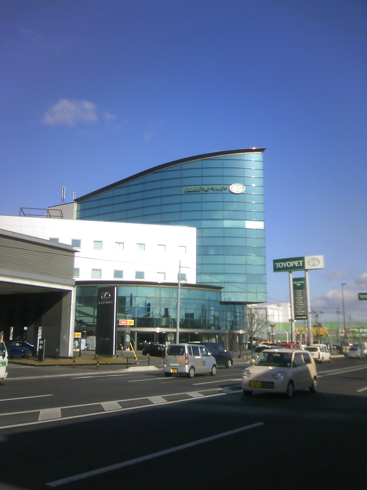 仙台トヨペット本社